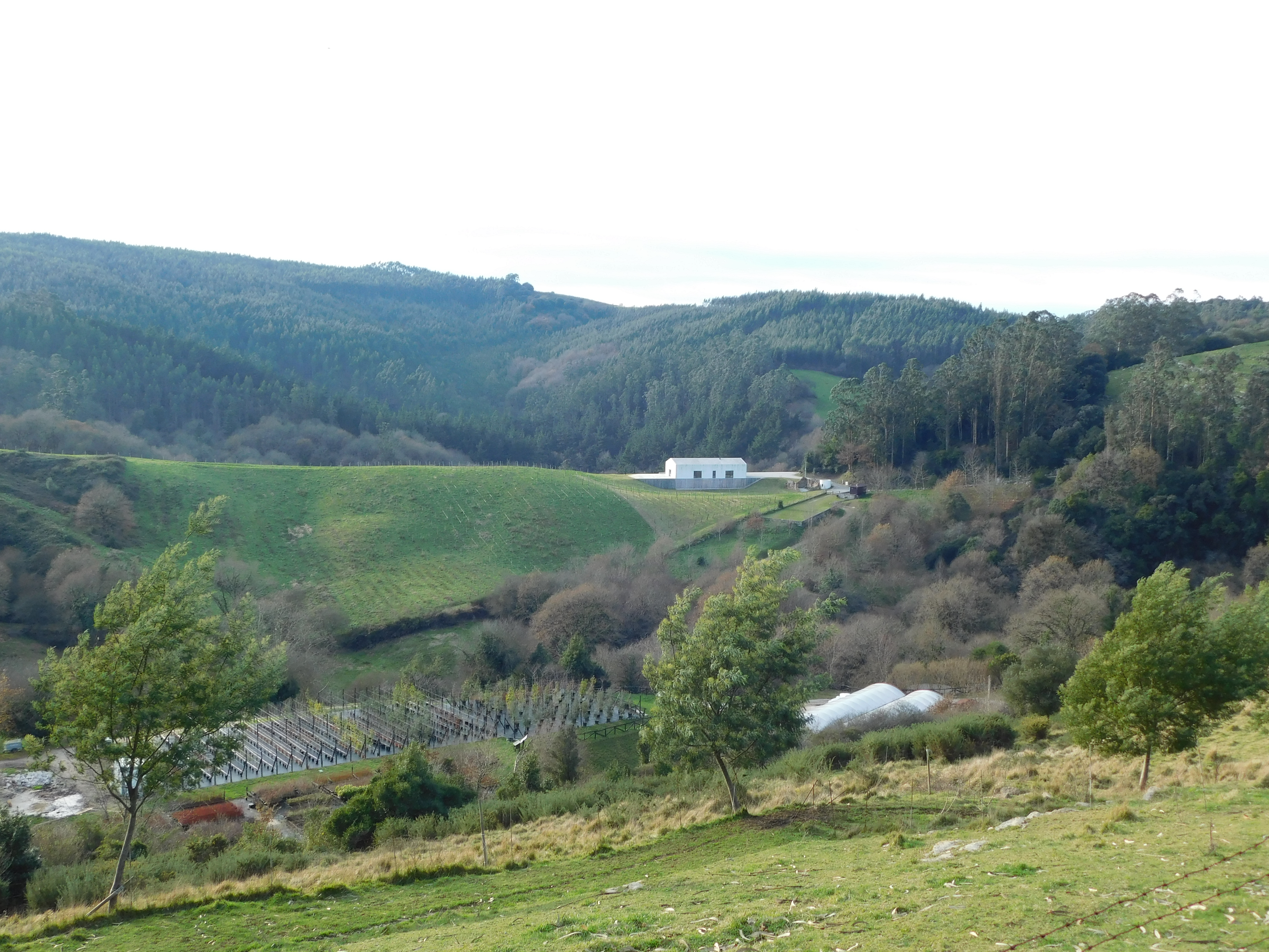 Pendo-Peñajorao ANEI